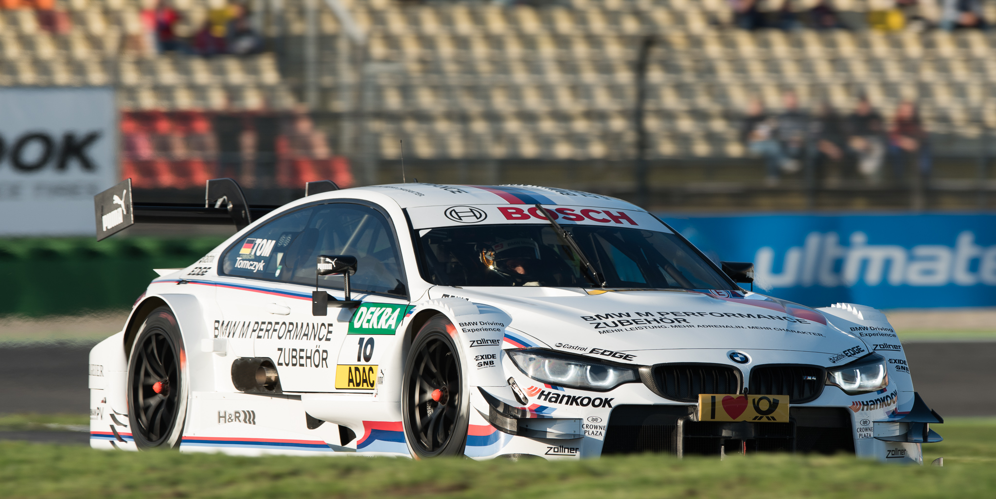 BMW M Performance Zubehör M4 DTM,DTM,Deutsche Tourenwagen Masters,Hockenheimring,Martin Tomczyk,Motorsport